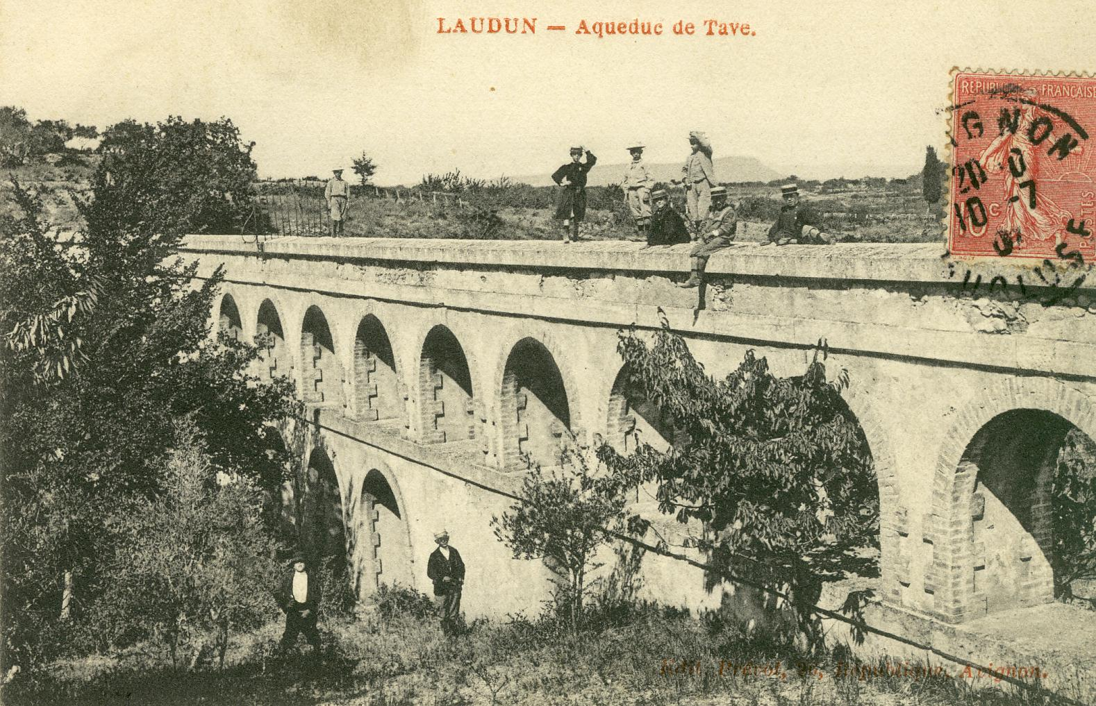 Laudun-l'Ardoise (Gard - France) - l'aqueduc de Balouvière au début du XXe siècle